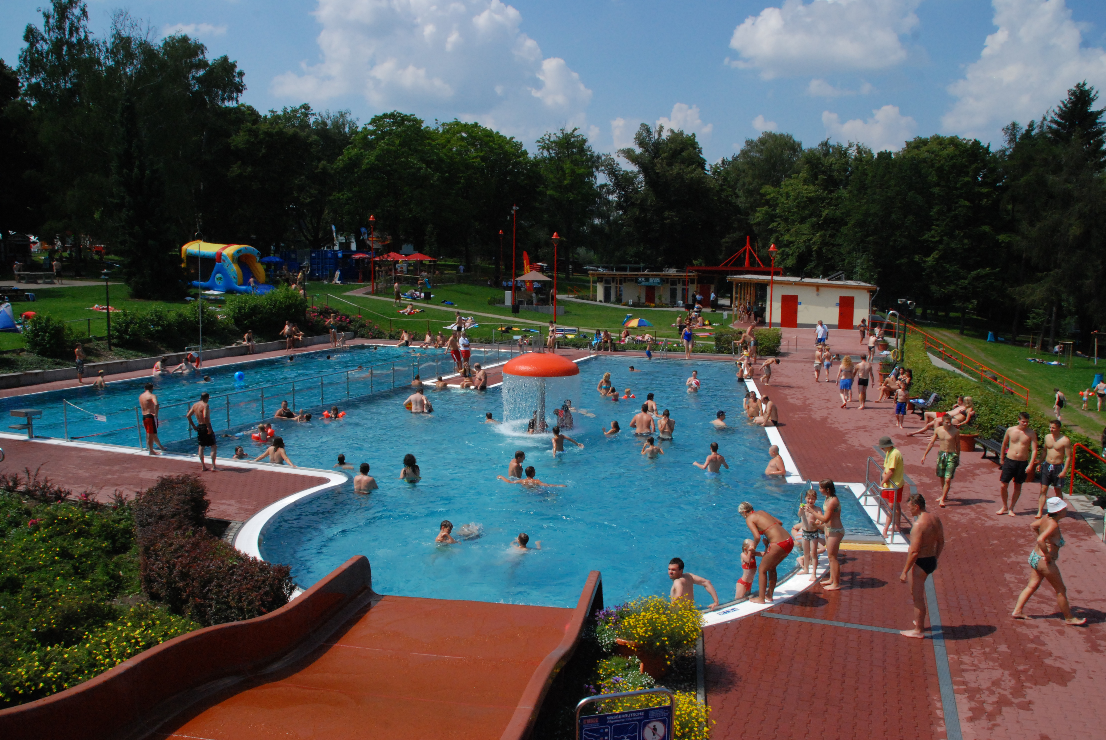 Schwimmer- und Nichtschwimmerbecken